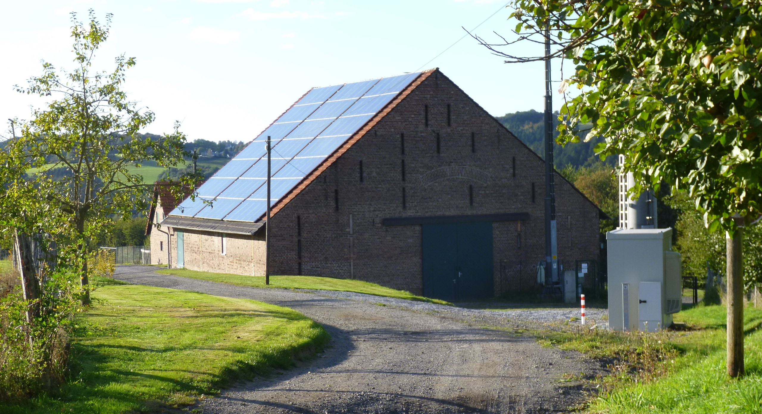 Gut Forkscheid